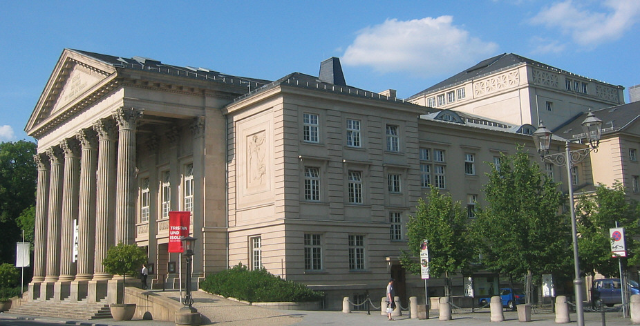 Meiningen, Germany, Staatstheater